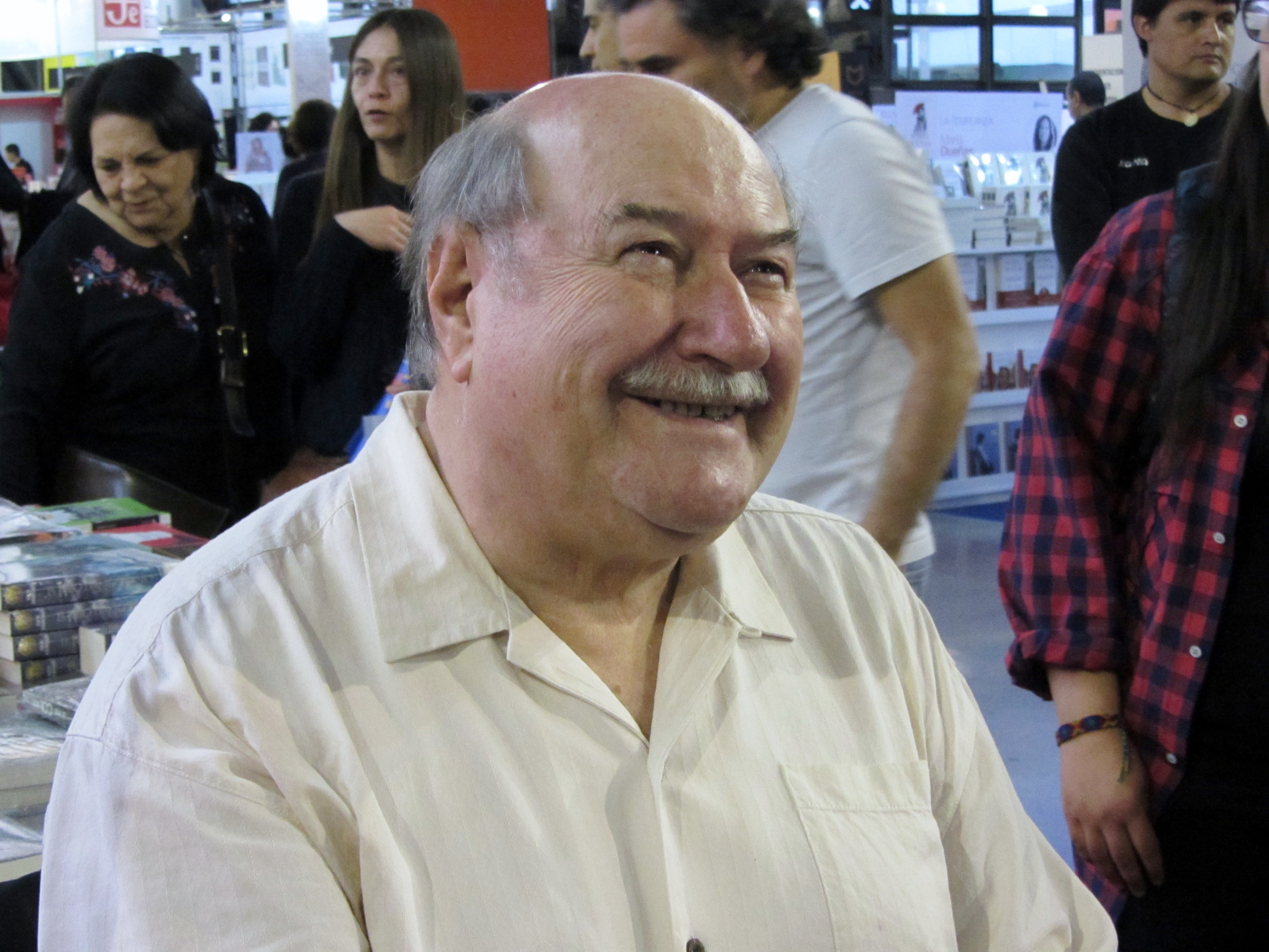 El escritor chileno Antonio Skármeta en la Feria Internacional del Libro de Santiago 2015